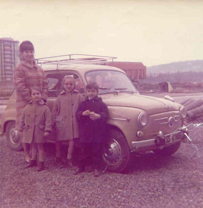 Familia: Lumbreras Losantos. Atzean "La casa de los pilotos" delako eraikina